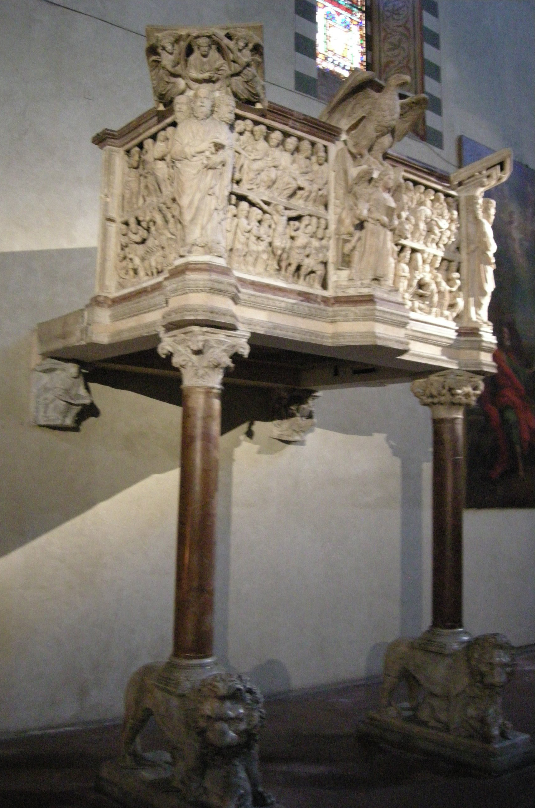 San Giovanni Fuorcivitas, interno, pulpito di fra' guglielmo da pisa